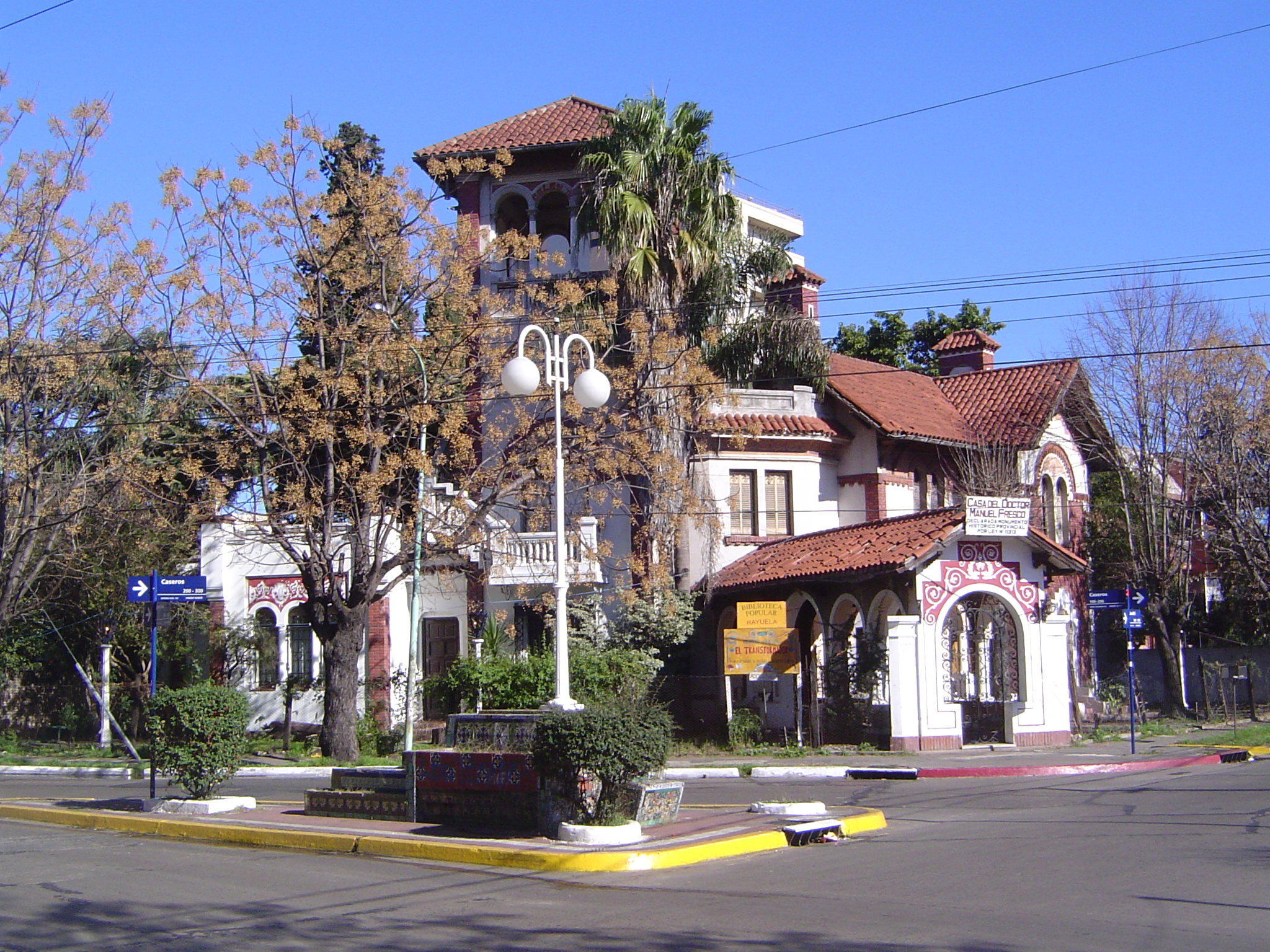 Casa de Manuel Fresco, gobernador de la Provincia de Buenos Aires entre 1936 y 1940. Hoy centro comunitario El Transformador. Haedo, Provincia de Buenos Aires, Argentina.